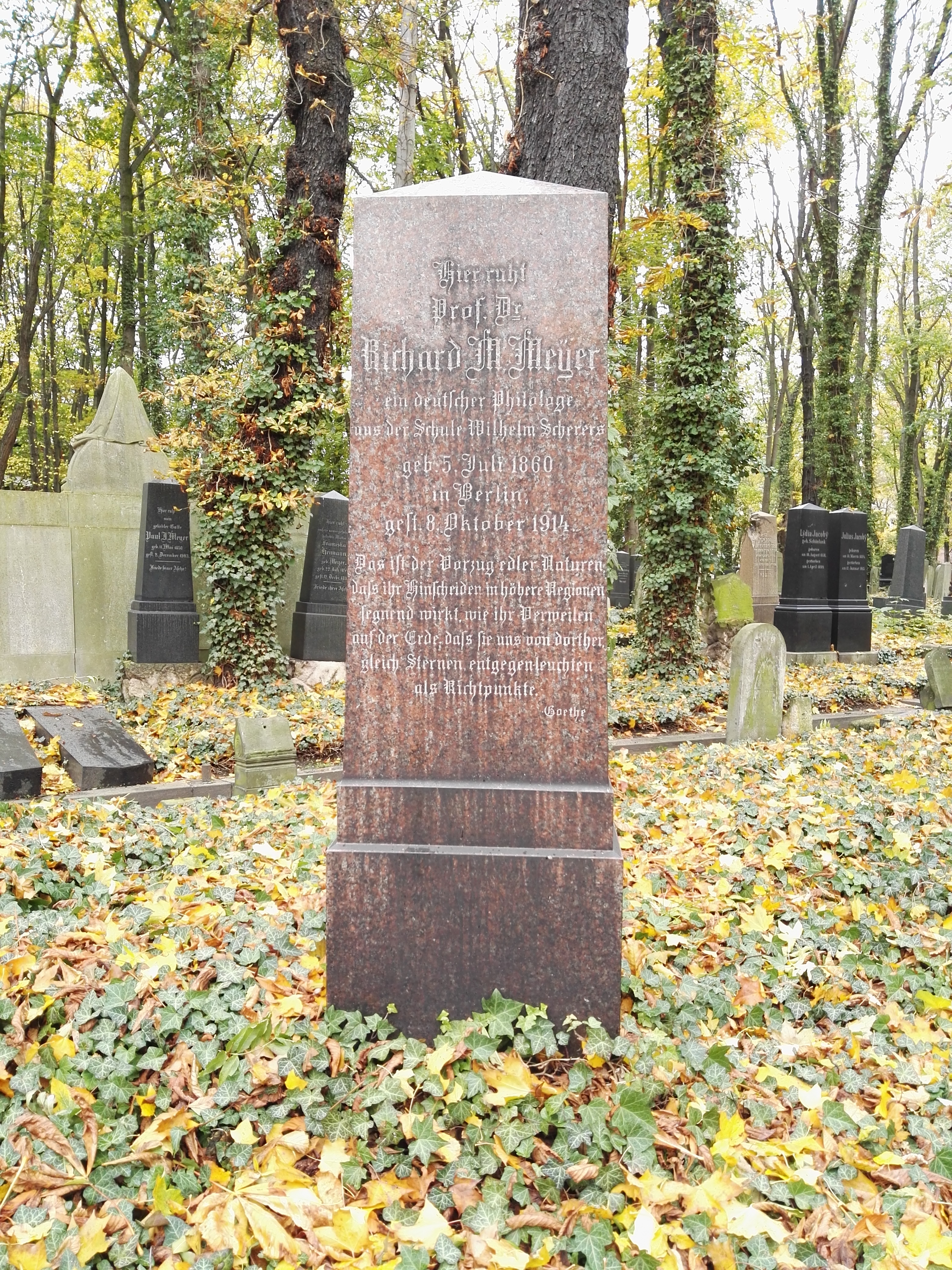 Grab von Richard M. Meyer auf dem Jüdischer Friedhof Schönhauser Allee in Berlin-Prenzlauer Berg